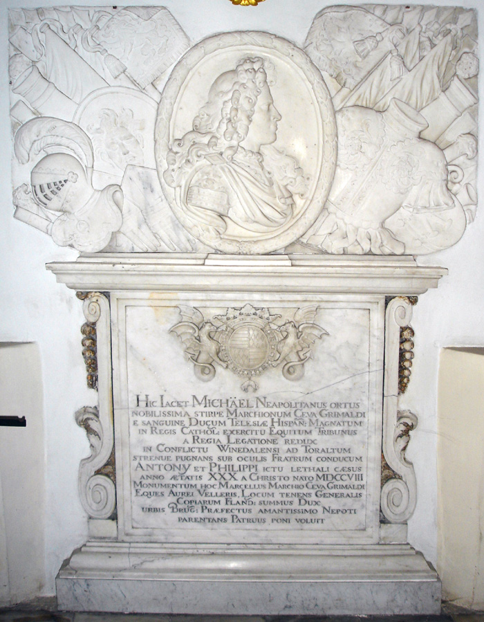 Grafmonument van Michael Ceva Grimaldi, Spaans officier gesneuveld in de Slag bij Wijnendale (1708), in de Sint-Walburgakerk te Brugge.